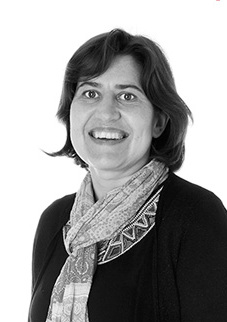 Valérie Masson-Delmotte. Extrait de la série Infinités Plurielles@Marie-Hélène Le NY-2015.